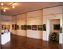 Дружество на бургаските художници - арт галерия